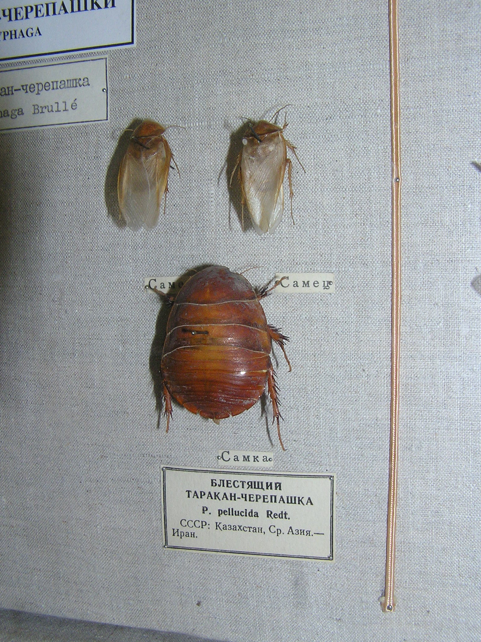 Polyphaga pellucida